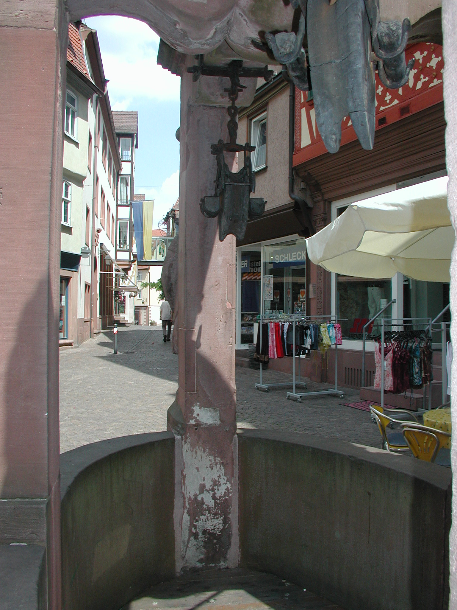 Bild: WertheimAltst.JPG